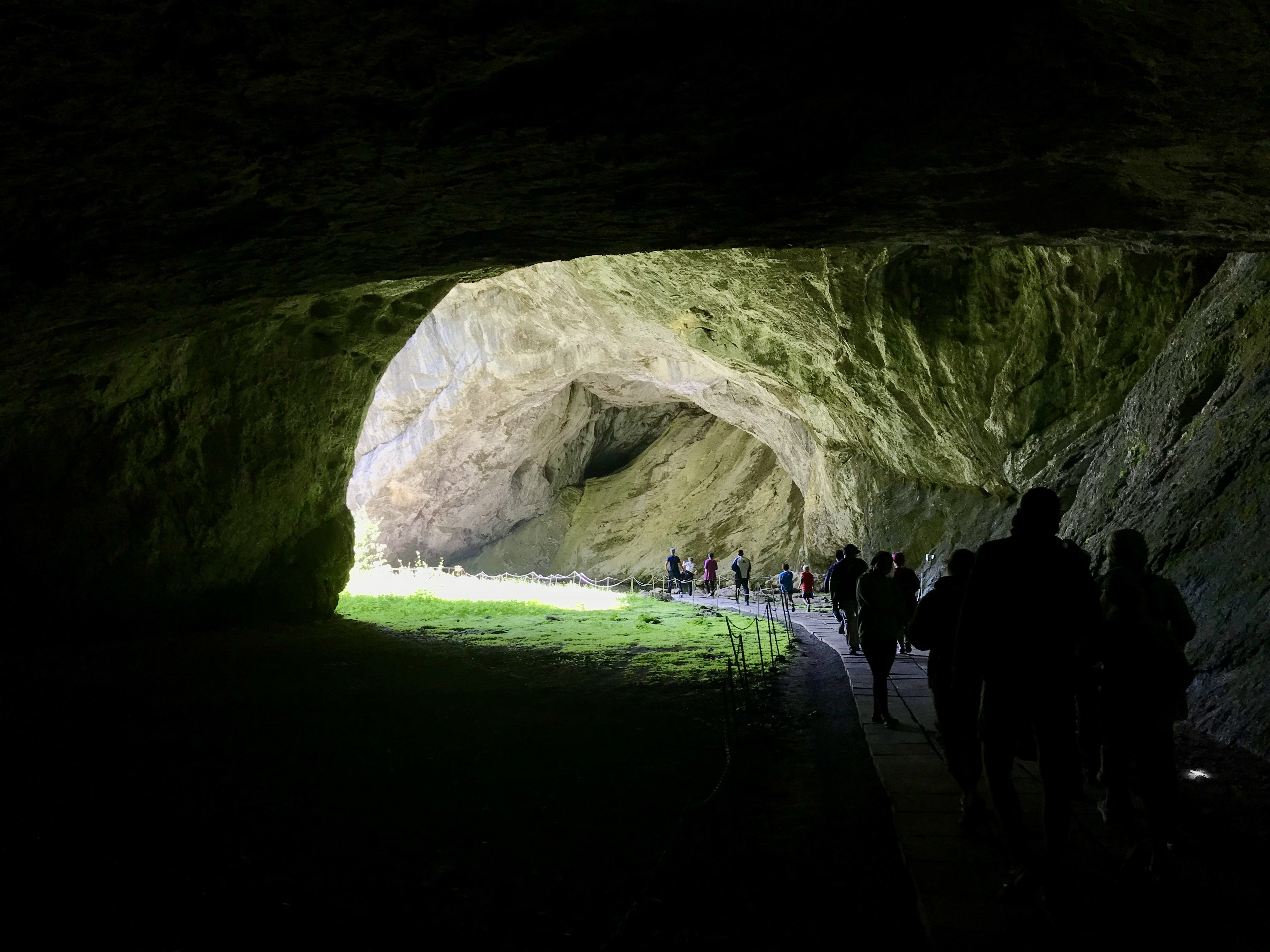 Большая Капова пещера (Шульган-Таш): Иргизлы, Бурзянский район, Башкортостан This image is related to the protected area of Russia number 0220101